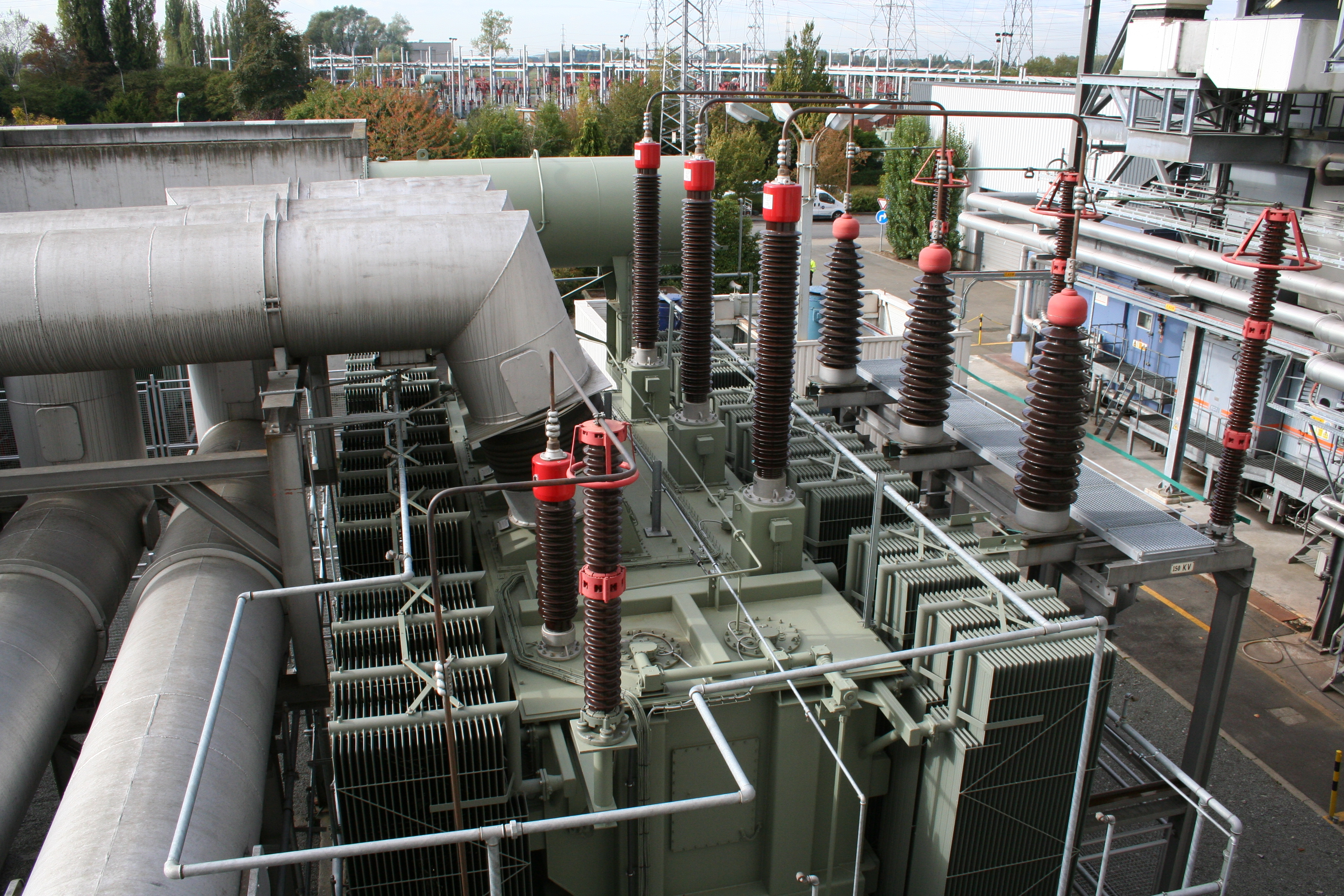 Boven zicht op de Generator transformator 375MVA 22/150kV van de centrale van Ruien